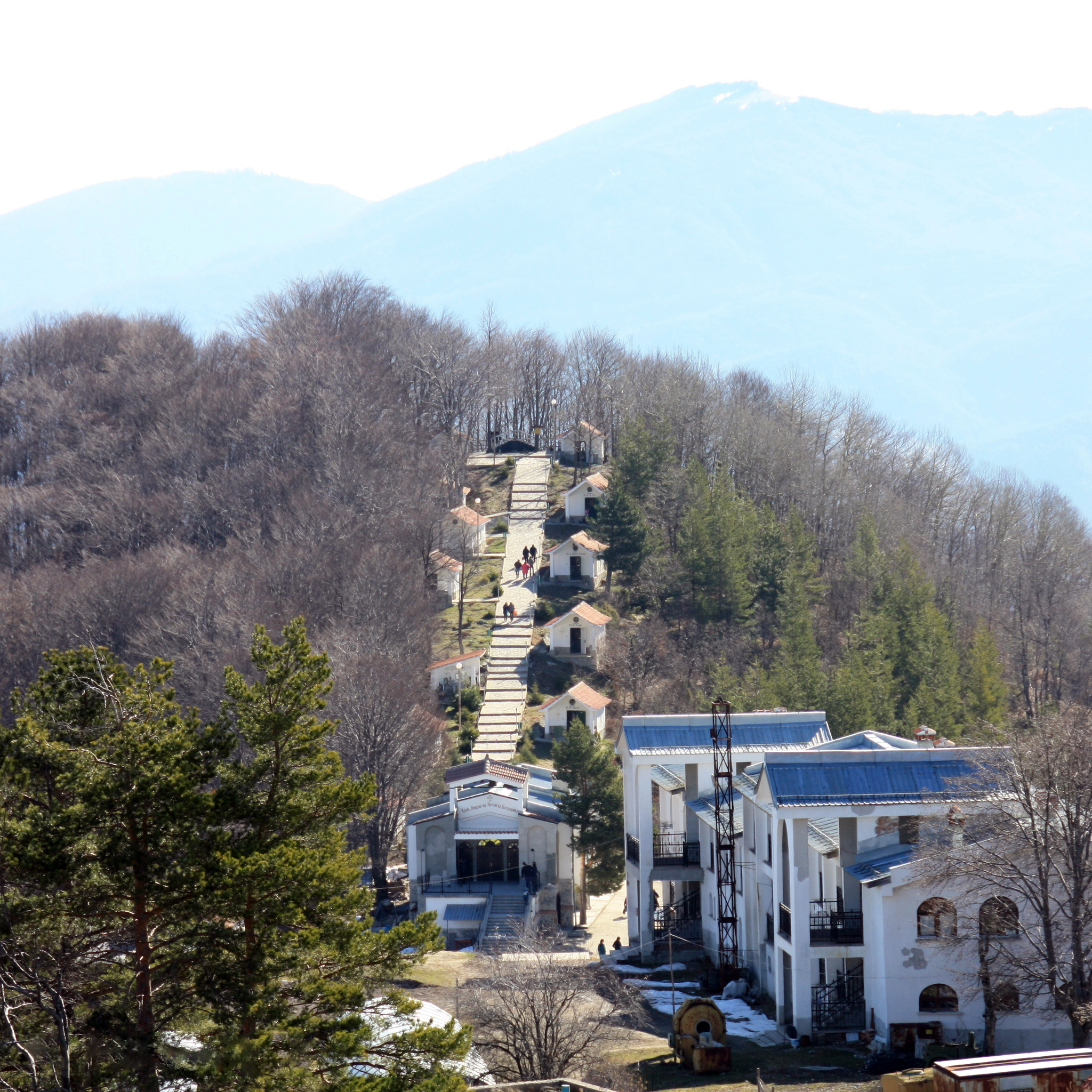 Манастирът на Кръстова гора, Родопите (между Лъки и Асеновград): пътят от Кръстов връх към връх Кръста (с разпятието) – отпред отдясно хотел, в центъра църква „Покров на пресвета Богородица“, после комплексът от 9 параклиса „12 апостоли“ (не се виждат други 3 параклиса наляво по склона от върха